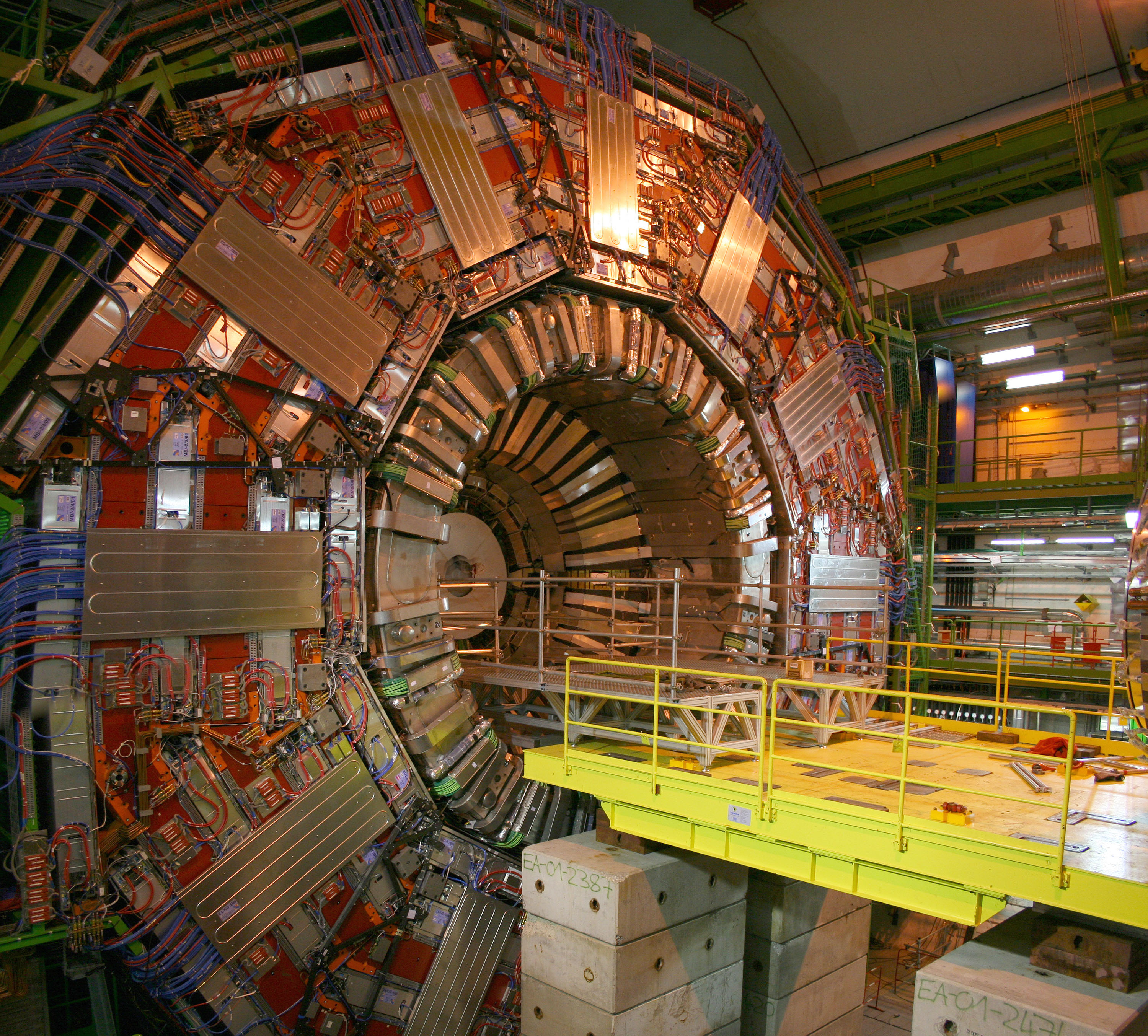 CMS experiment at CERN